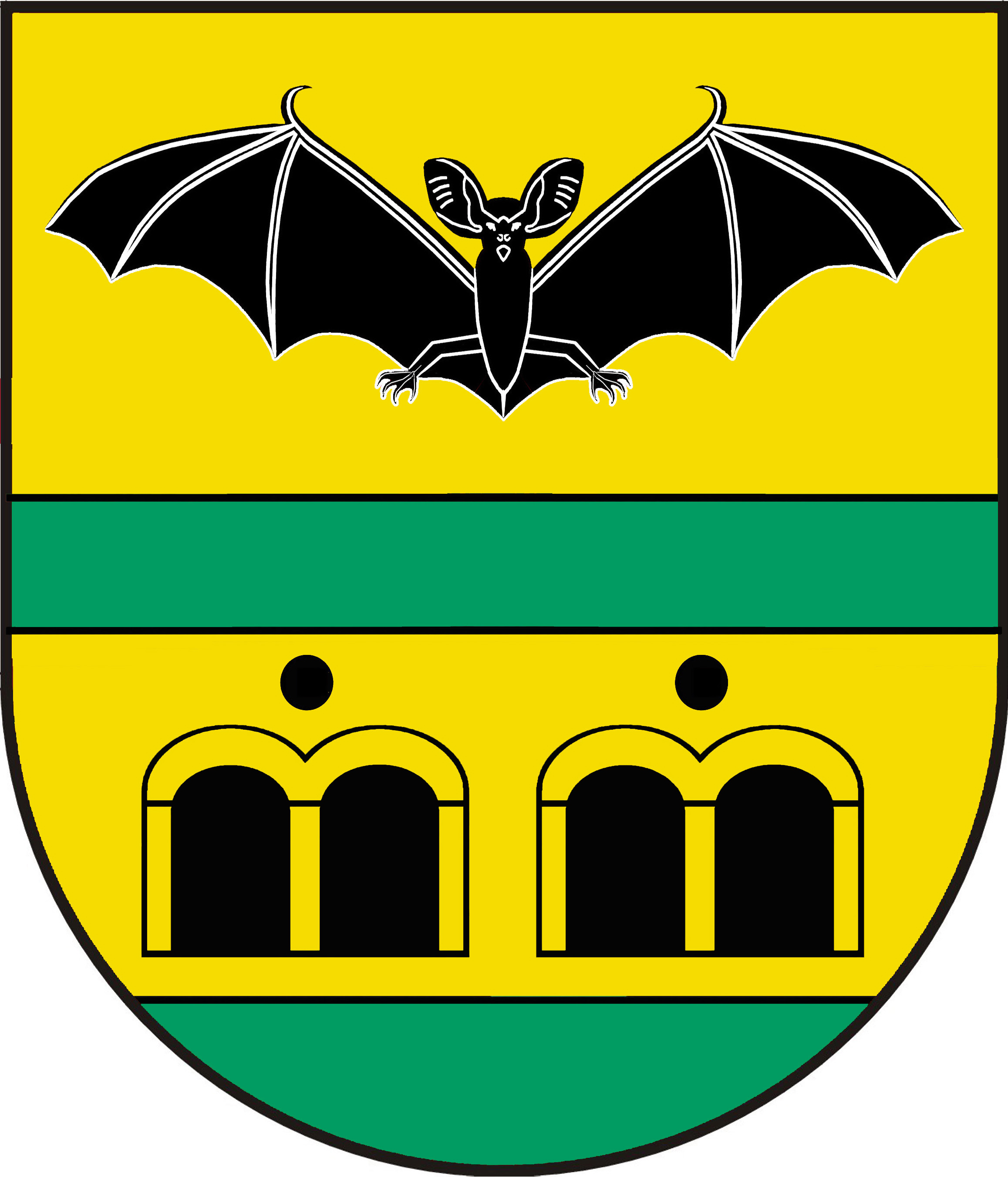 Herb gminy Piątnica